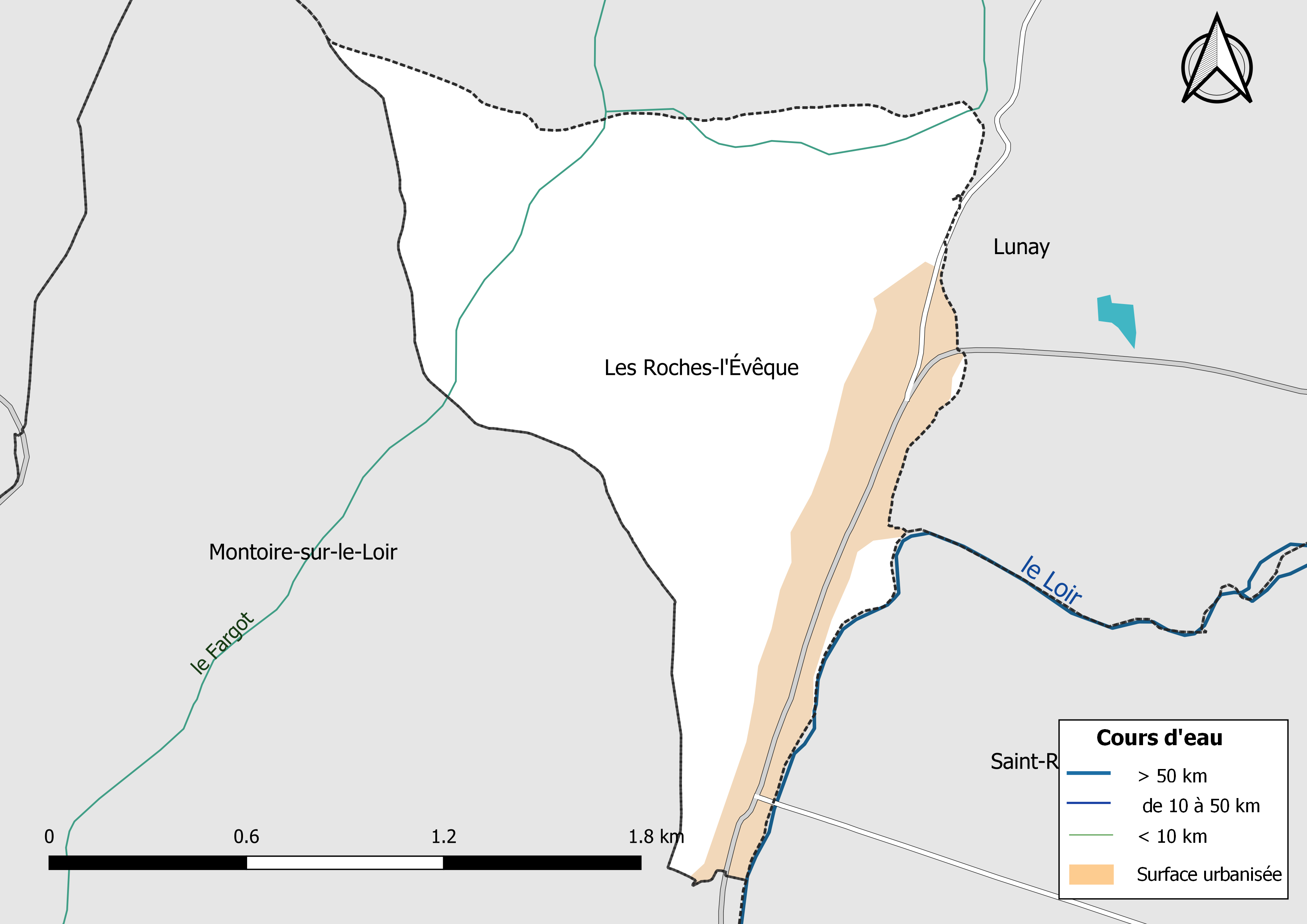 Carte du réseau hydrographique de la commune de Les Roches-l'Évêque (Loir-et-Cher, France).